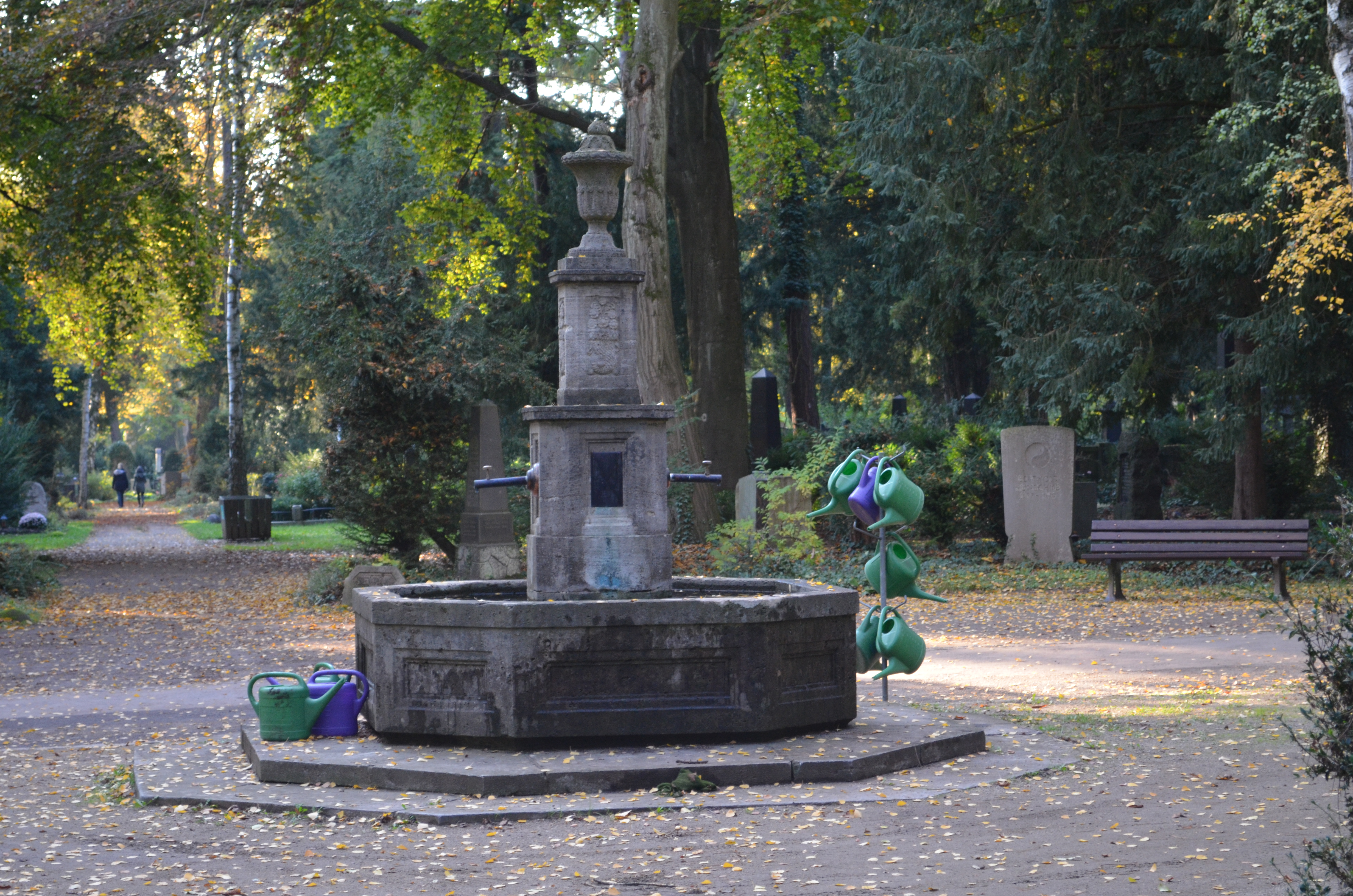 Frankfurt, Hauptfriedhof, Brunnen im Birkenwäldchen